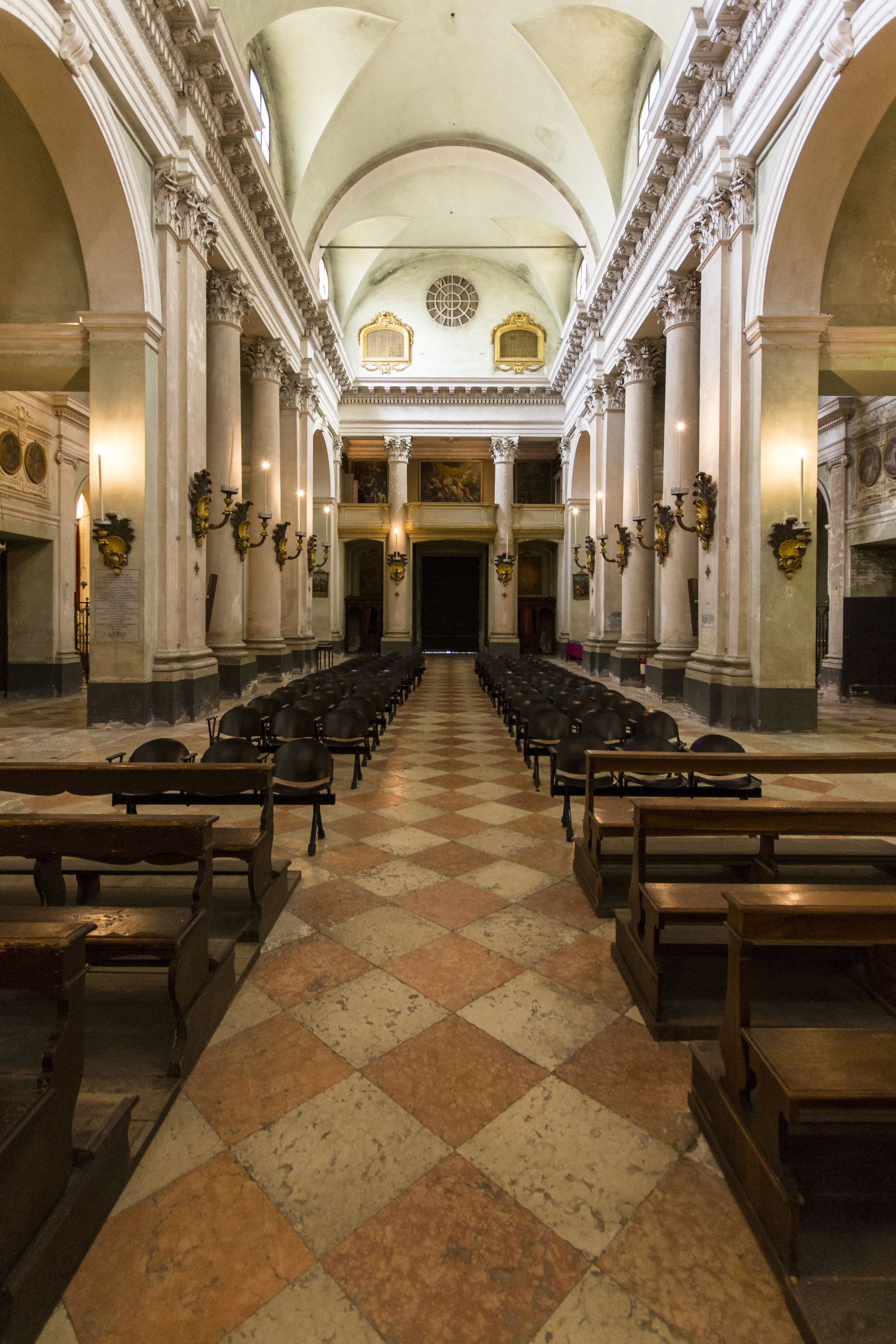 La chiesa della Reggia. This is a photo of a monument which is part of cultural heritage of Italy.